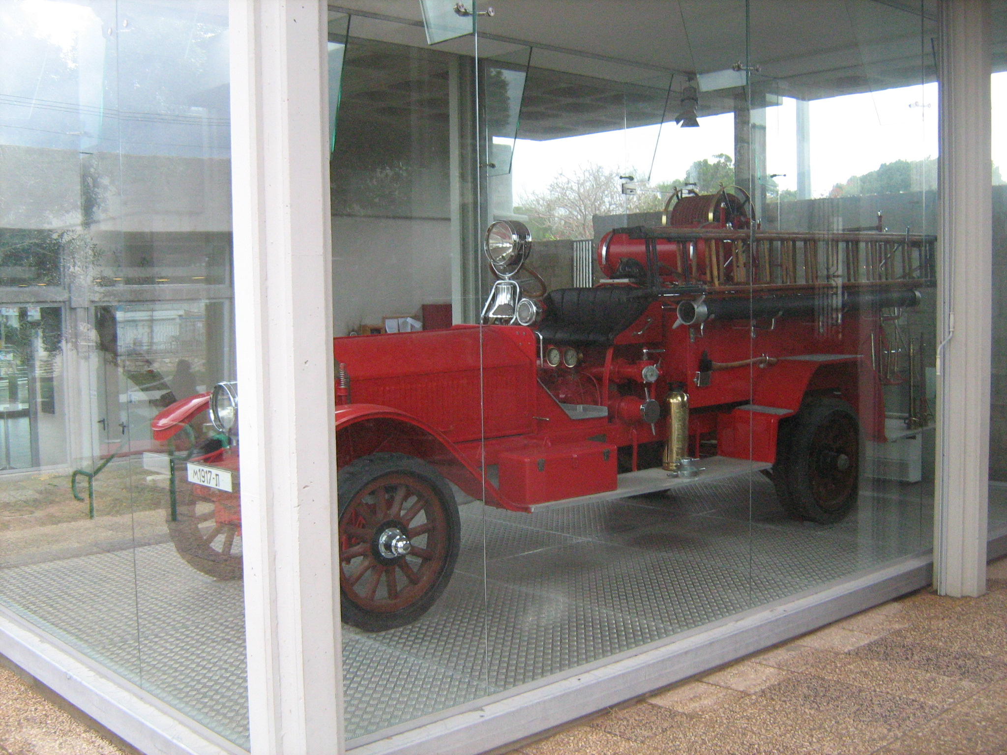 הכבאית במוזיאון א"י